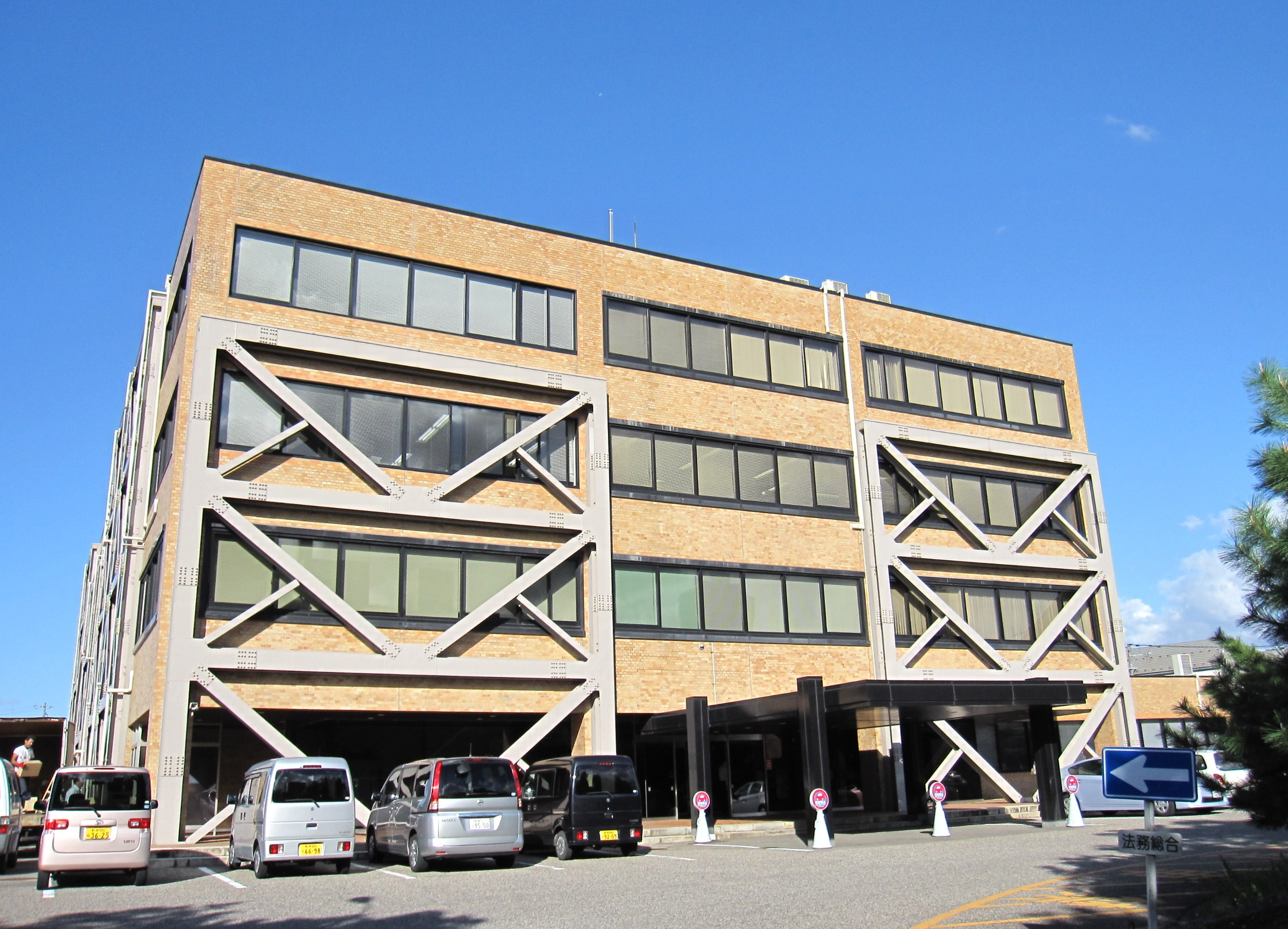 新潟法務総合庁舎